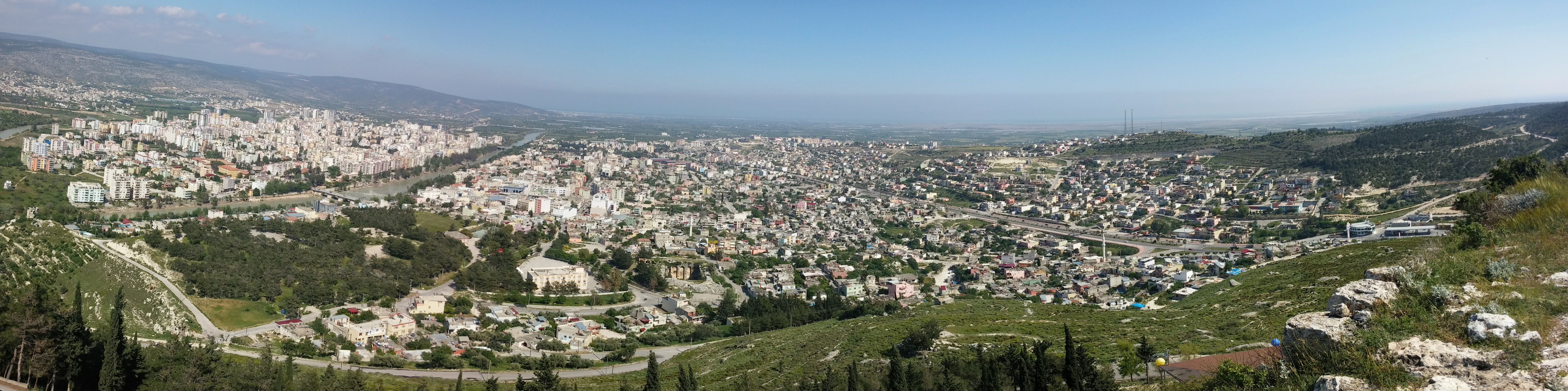 Silifke Kalesi'nden Silifke görünümü